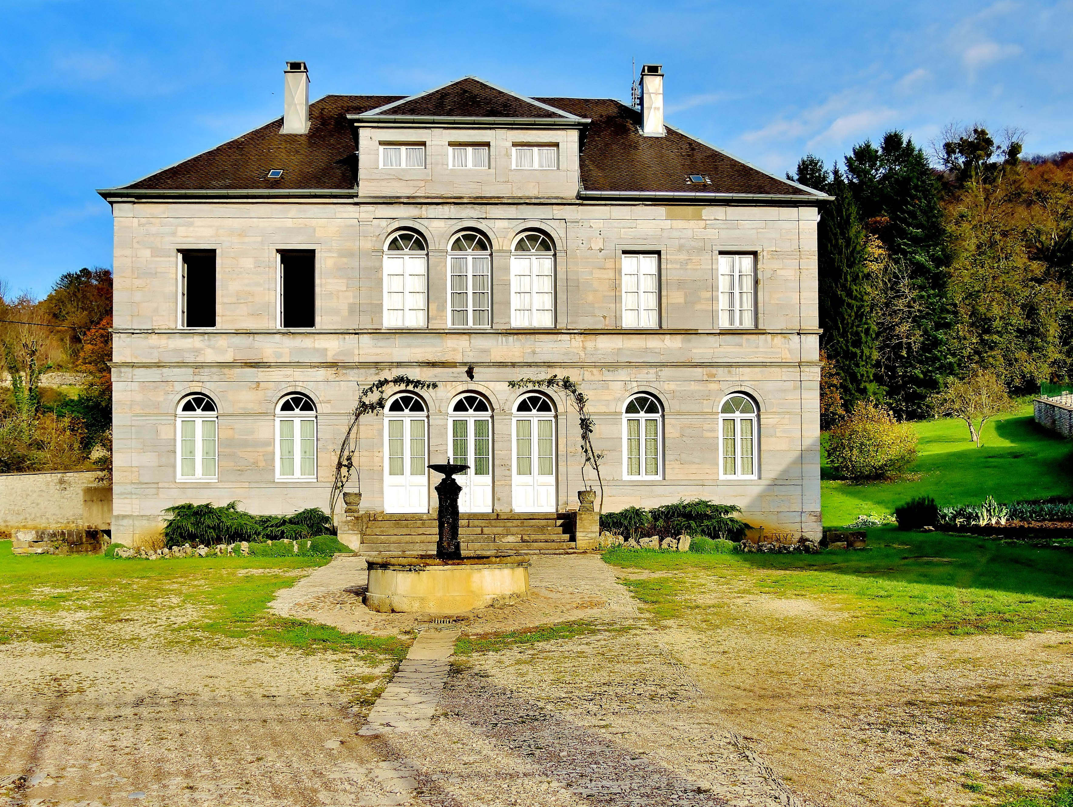 Façade du château du général Blondeau, à Clerval, Doubs.